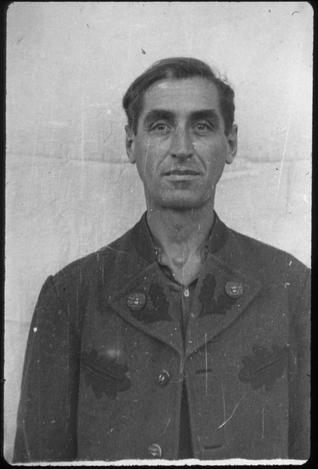 Franz Xaver Trenkle (* 23. Dezember 1898 ; † 28. Mai 1946 im Landsberg am Lech) war ein deutscher SS-Hauptscharführer und als stellvertretender Schutzhaftlagerführer des KZ Dachau und Schutzhaftlagerführer des KZ Bergen-Belsen eingesetzt. Trenkle wurde im Dachau-Hauptprozess zum Tode verurteilt und hingerichtet.